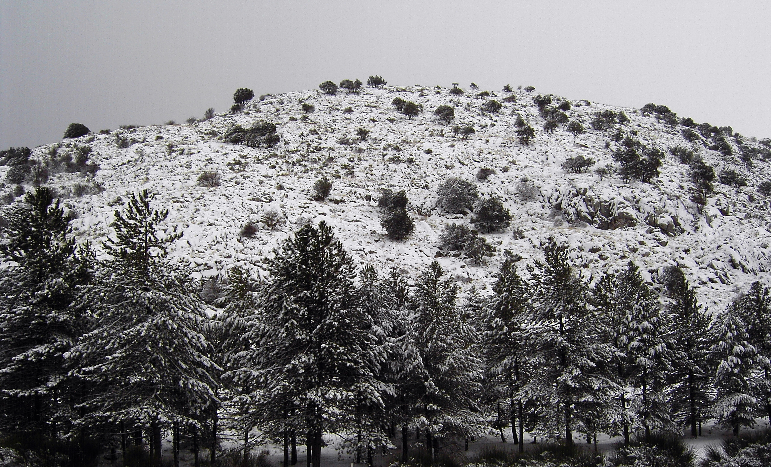 Puerto de la Mora (Granada, España)